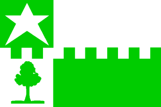 Vlag gemeente Stede Broec